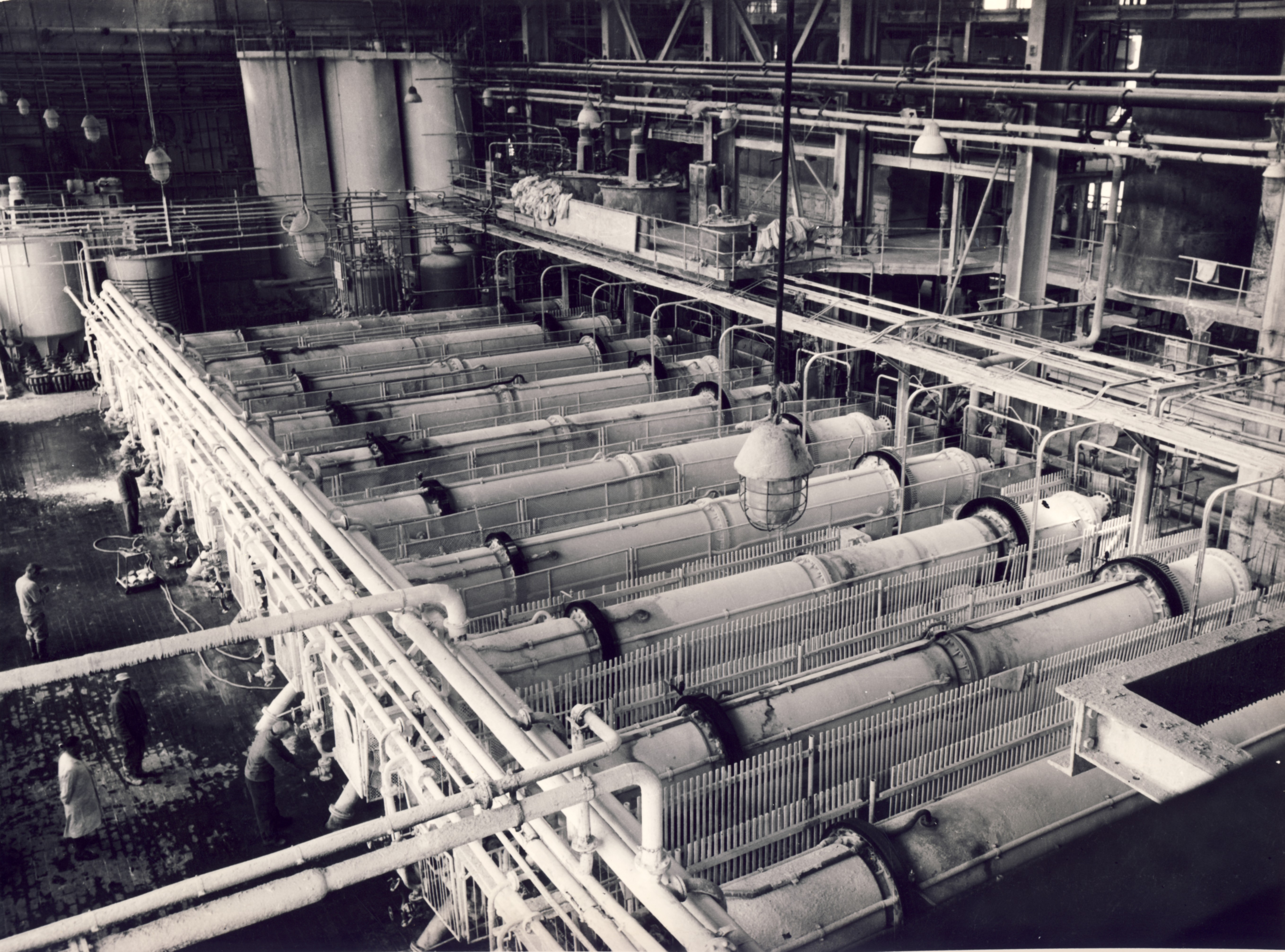 Drehrohrautoklaven zur PVC-Herstellung im EKB, bei der Explosion am 11.7.1968 zerstört